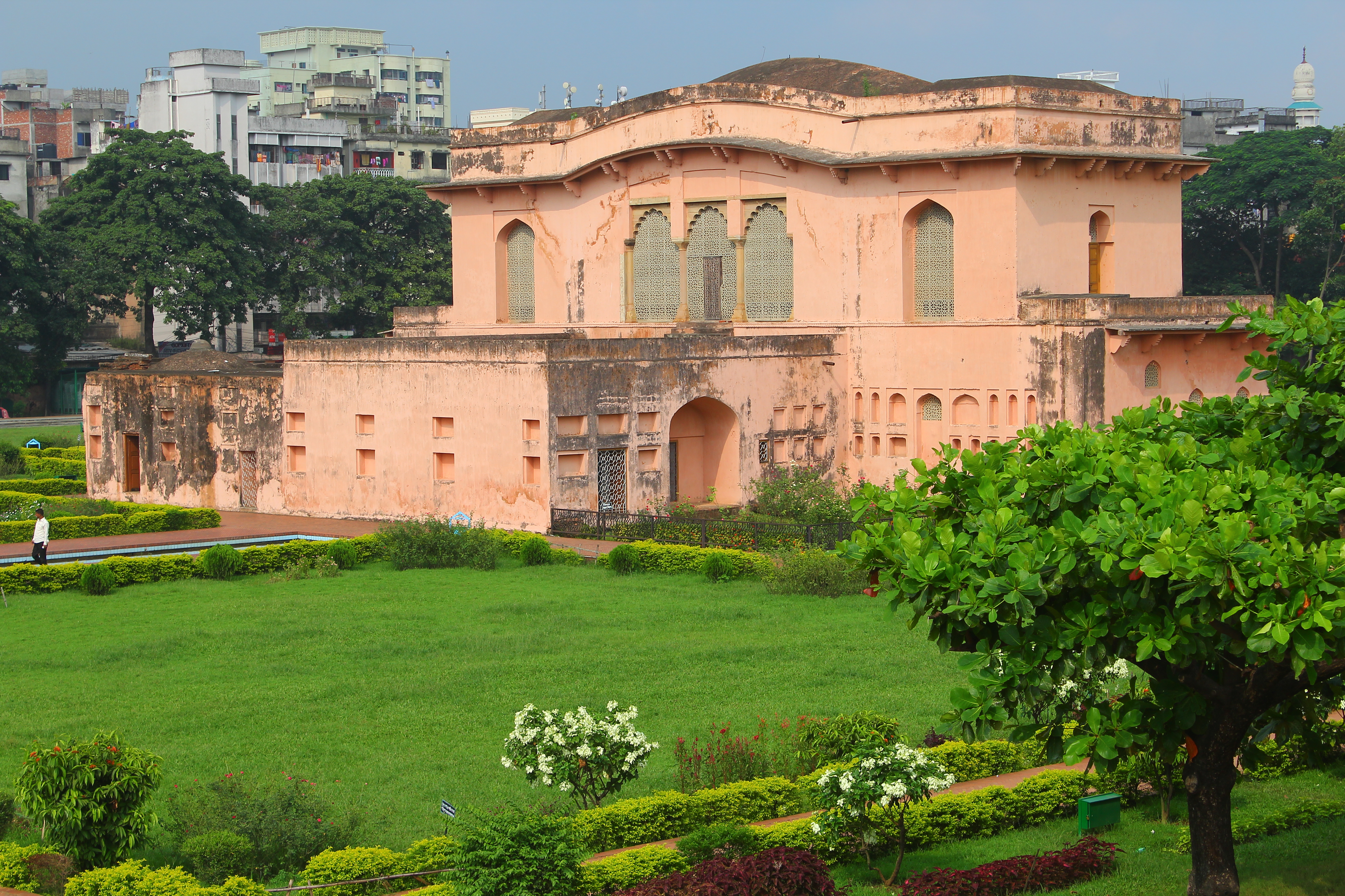 লালবাগ দুর্গের দরবার হল ও হাম্মাম খানা